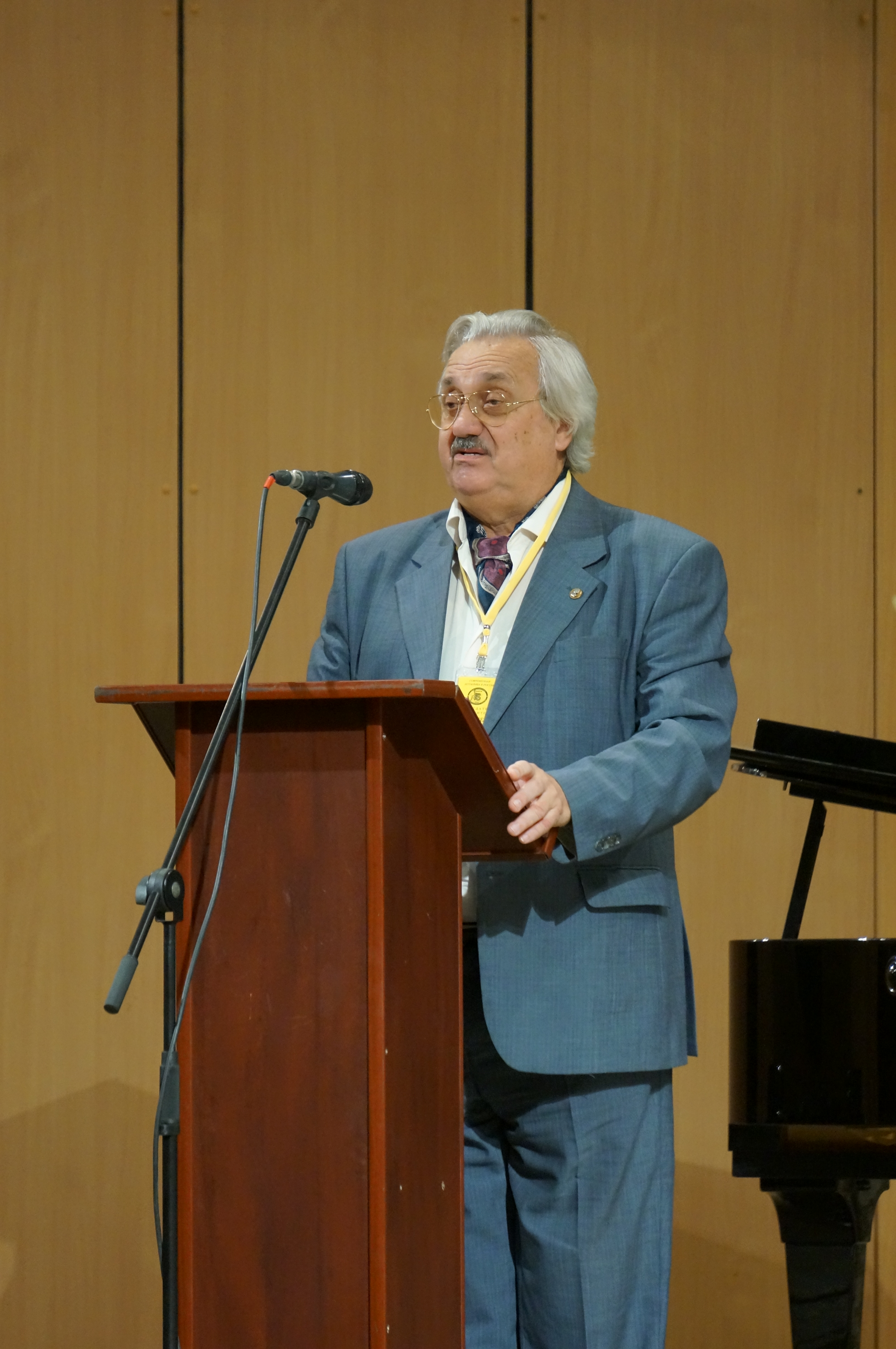 Геннадий Самуилович Розенберг, XIII съезд Русского ботанического общества. Тольятти, 2013 год.